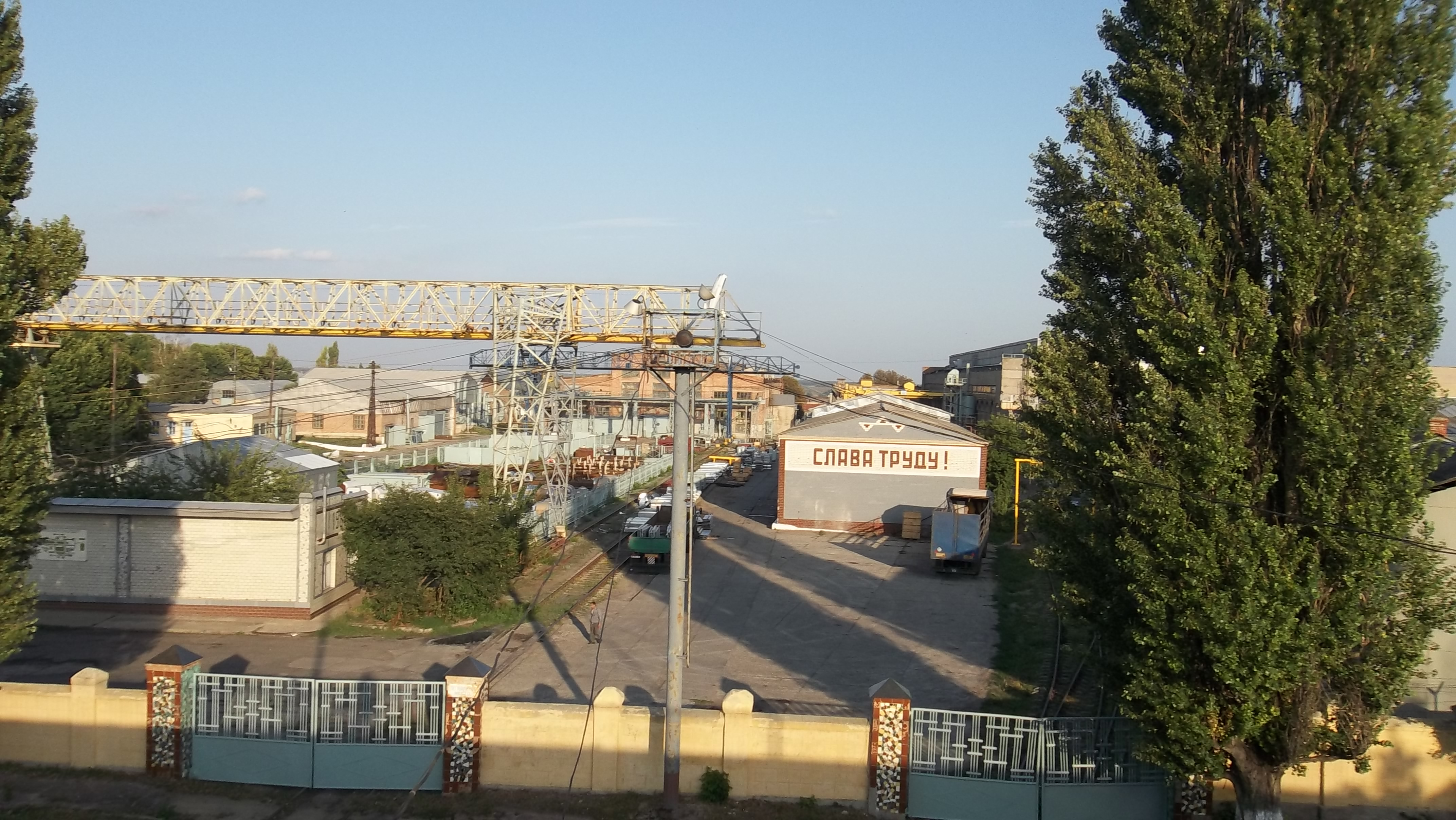 Машбуд